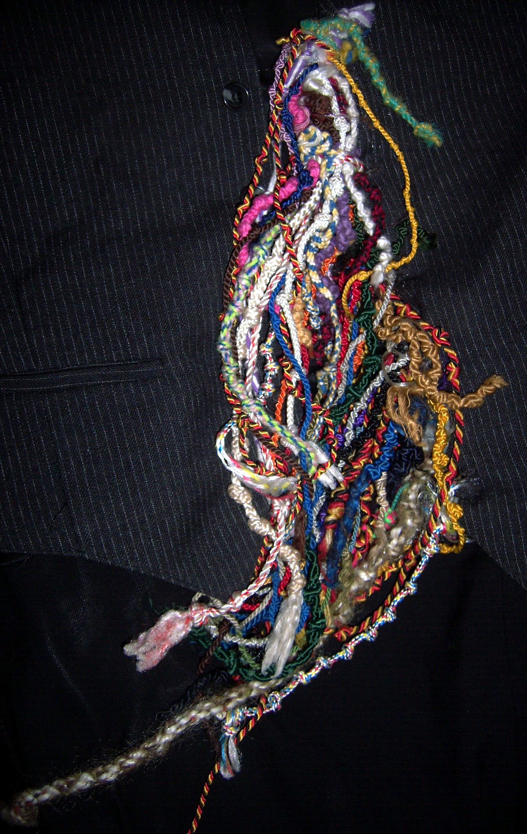 Bierkordel, eine Erfindung der DDR-Studentenverbindungen